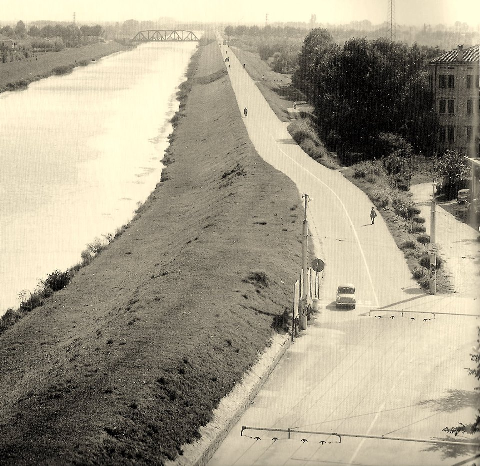 Quartiere Guizza negli anni '50.